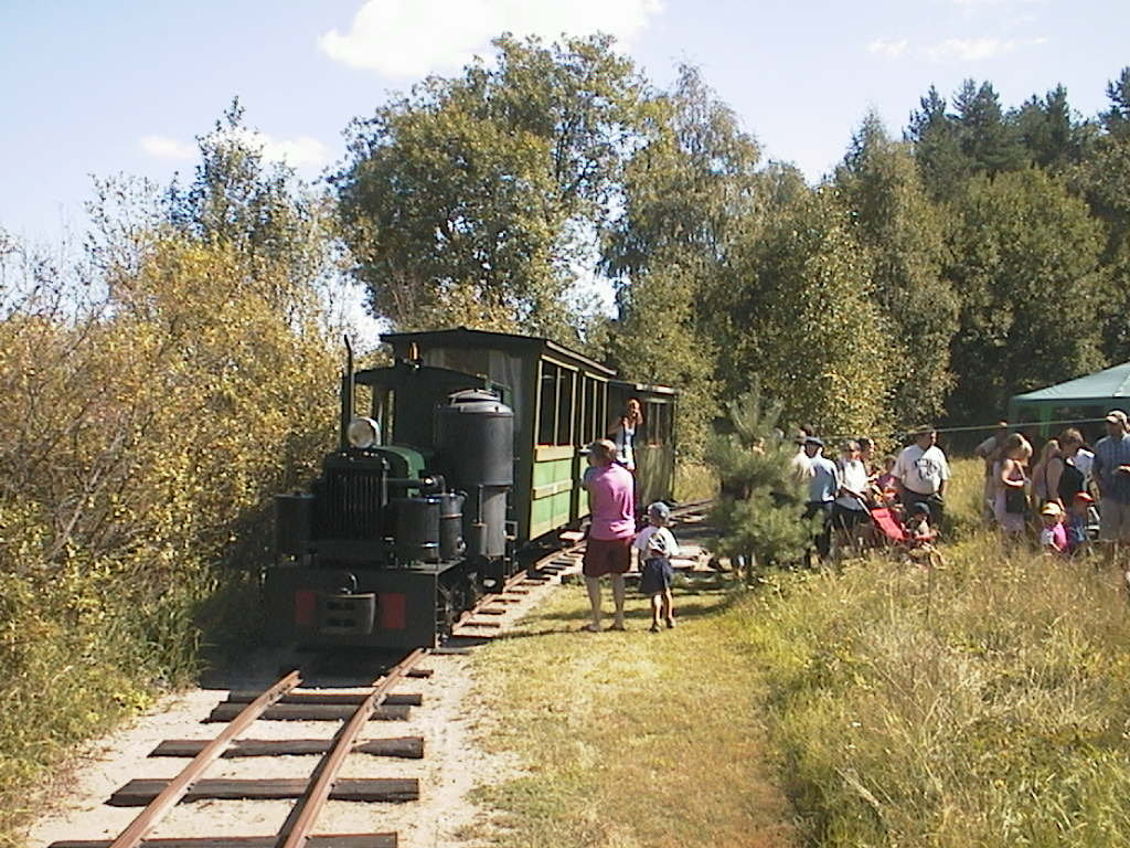 Lahnuksen Rautatien matkustajajuna tulossa Jokirannan seisakkeelle; veturina moottoriveturi ja vaunuina entisestä